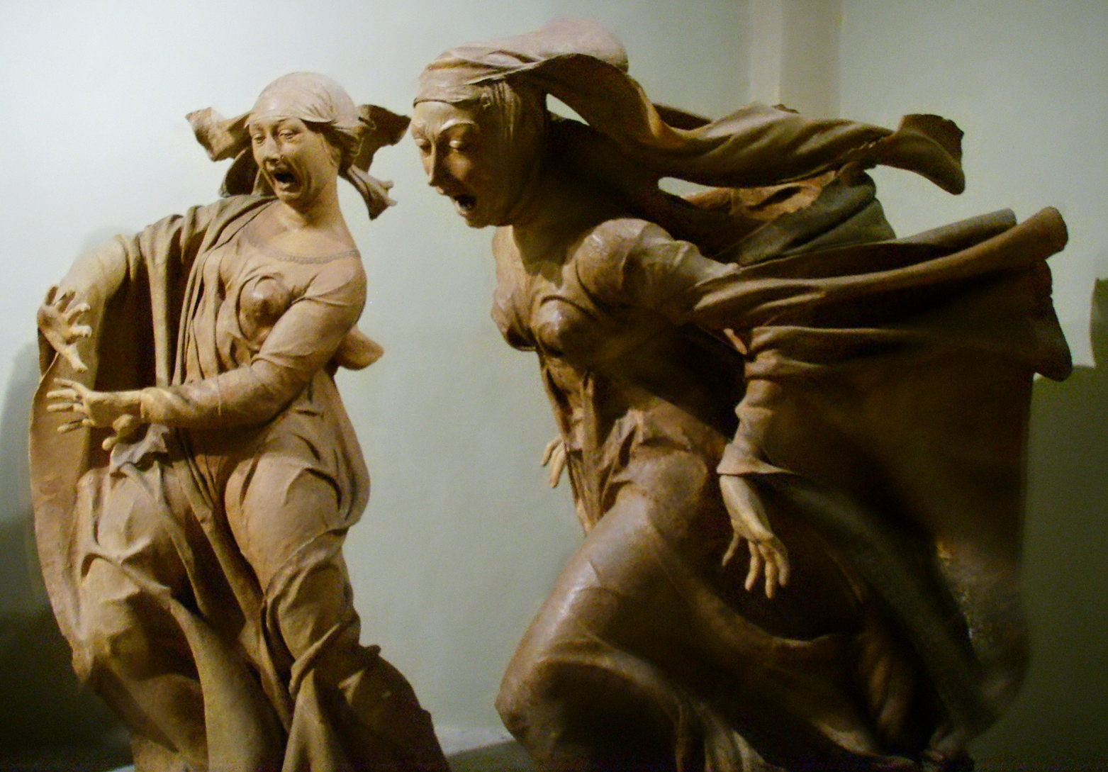 Niccolò dell'arca, Compianto sul Cristo morto, Chiesa di S. Maria della vita, Bologna